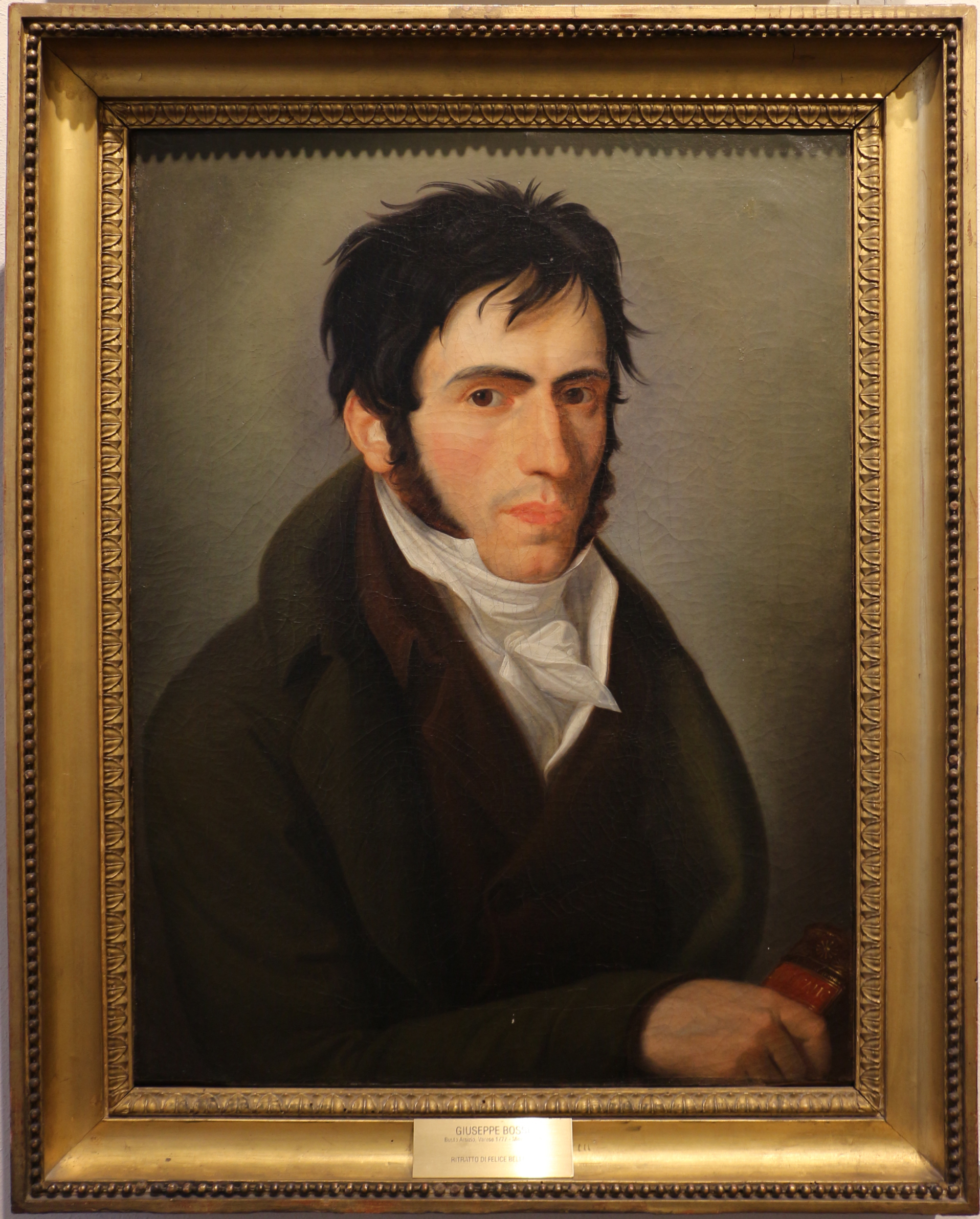 Paintings in the Civica galleria d'arte moderna (Milan) This is a photo of a monument which is part of cultural heritage of Italy.